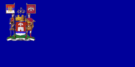 Flag of Niš, Serbia/Drapeau de la ville de Niš, Serbie